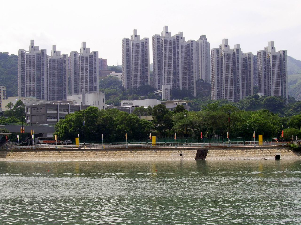 中文（香港）: 穗禾苑